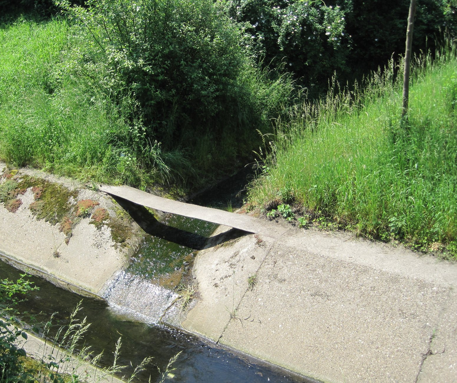 Stotzheimerbach (right). Destination: Randkanal